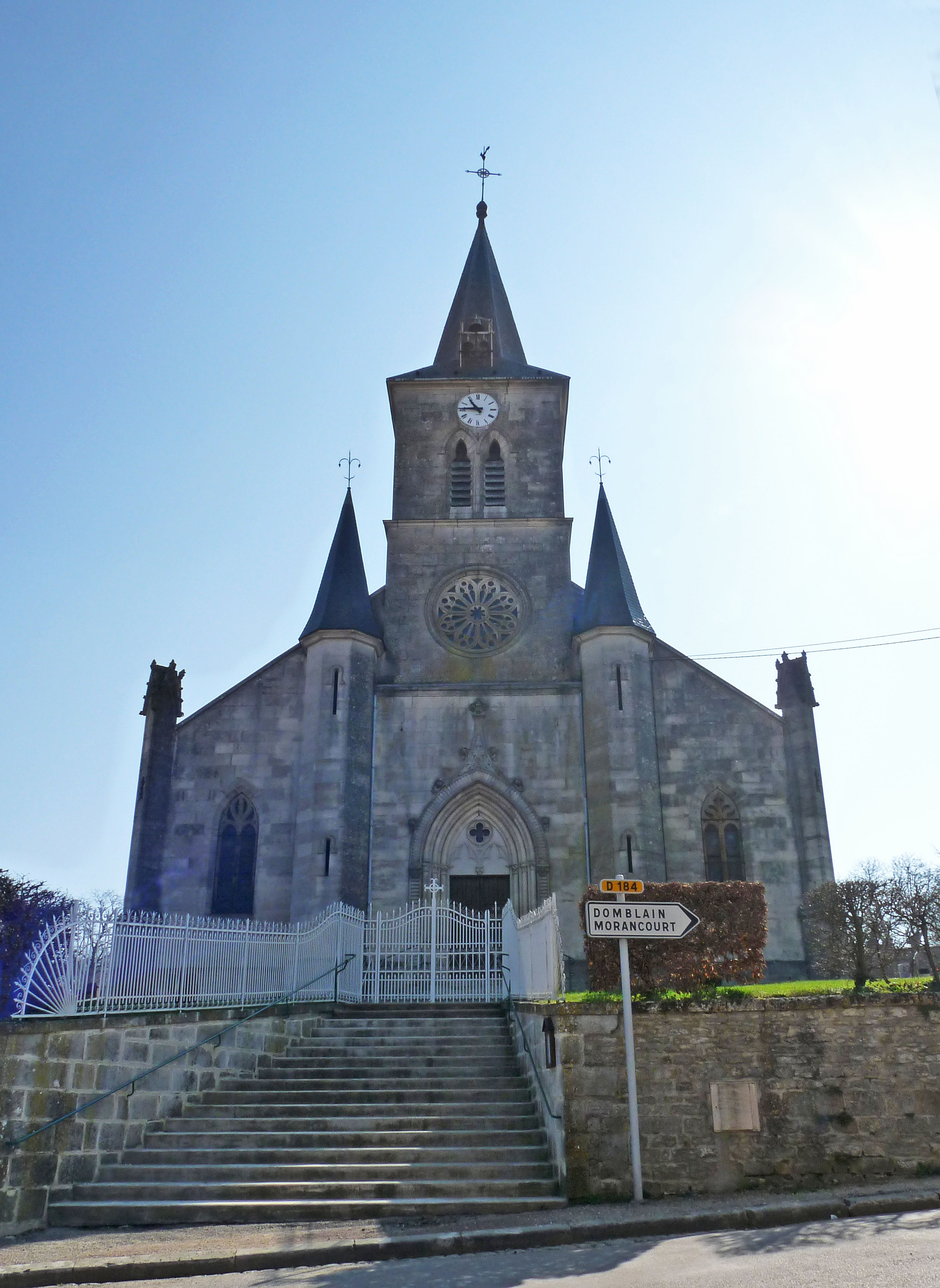 Eglise de Vaux-sur-Blaise (Haute-Marne)